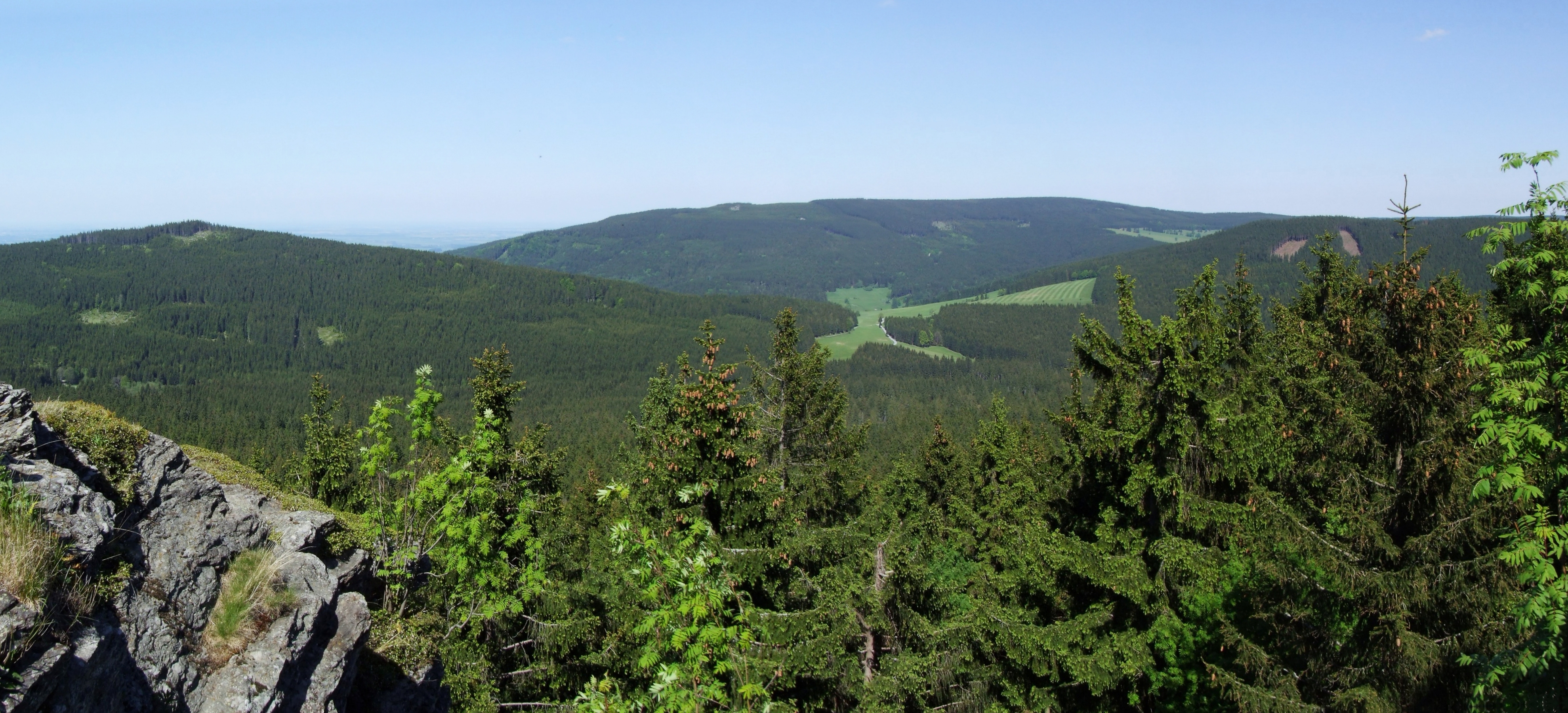 Česky: Jeseníky - pohled z Koberštejnu